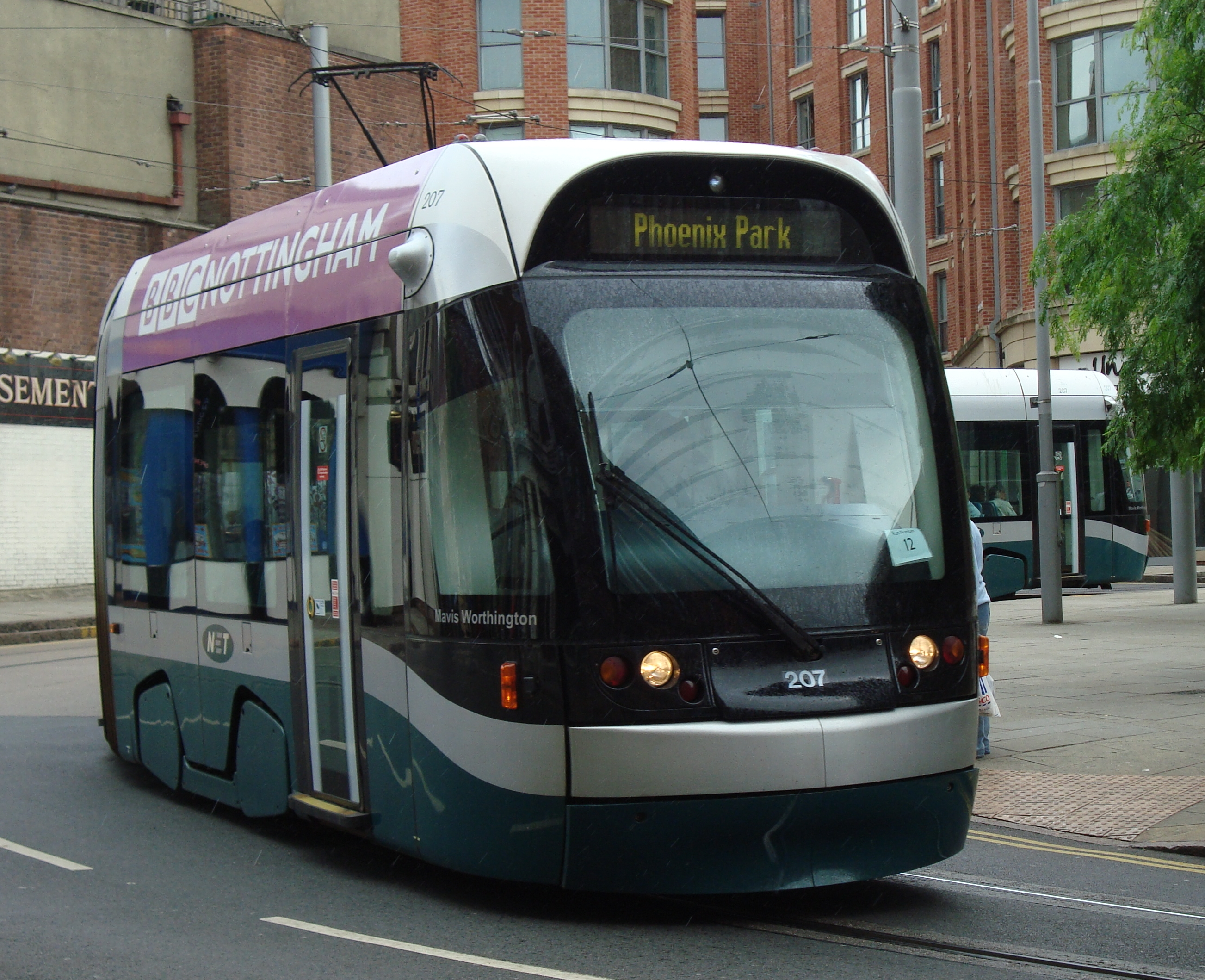 Nottingham ... tram.